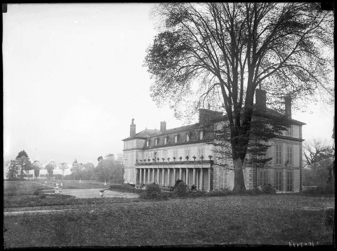 Domaine de Sandricourt à Amblainville (Oise).